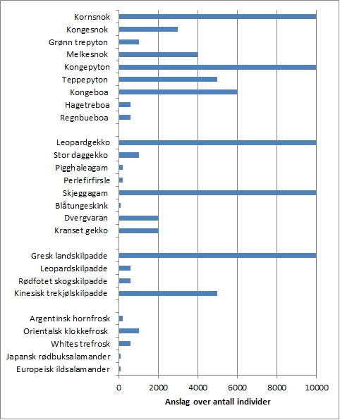 Tillatelsen er oversendt til OTRS